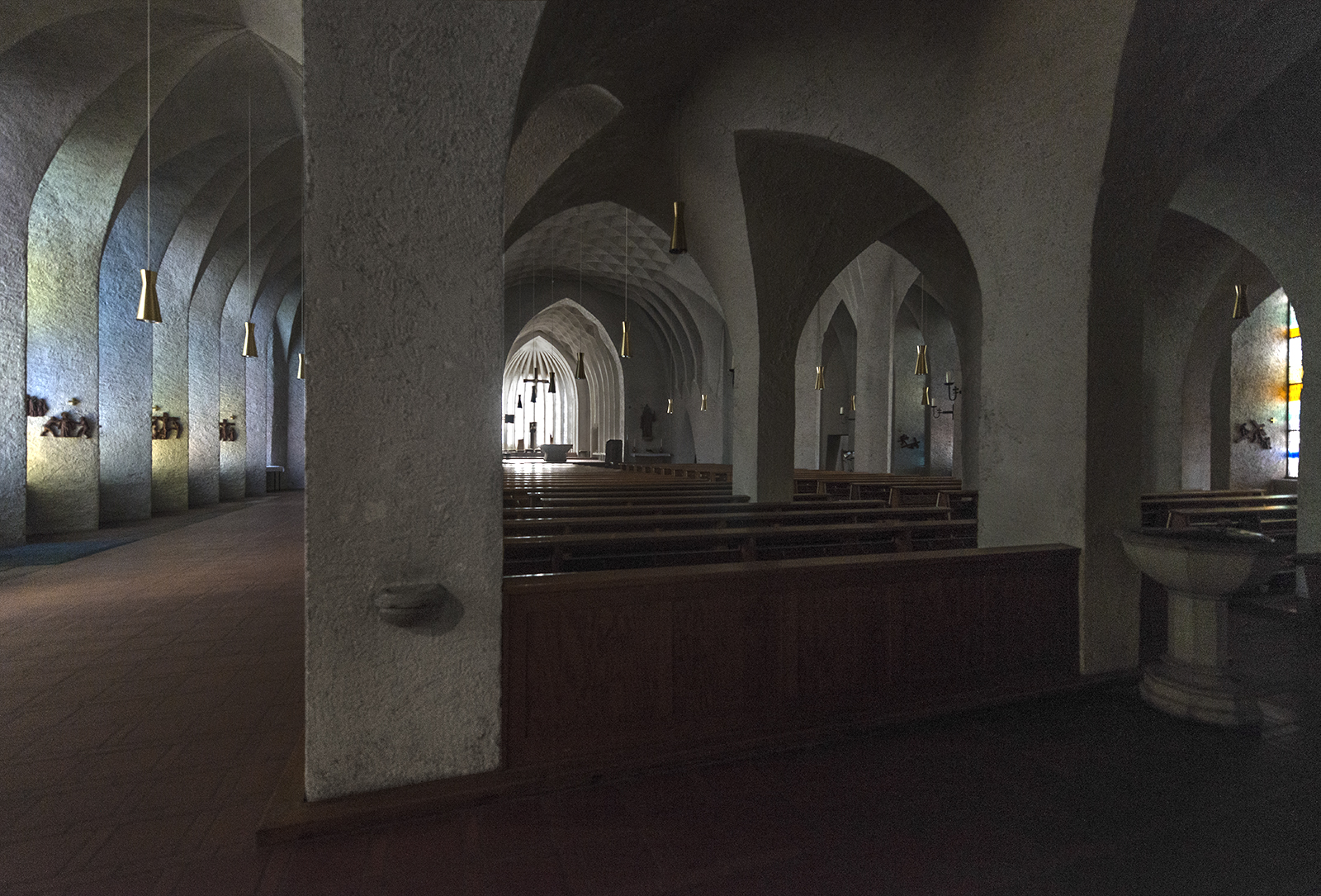 St. Johann-Baptist, Neu-Ulm, Kircheninneres, Blick zum Altar